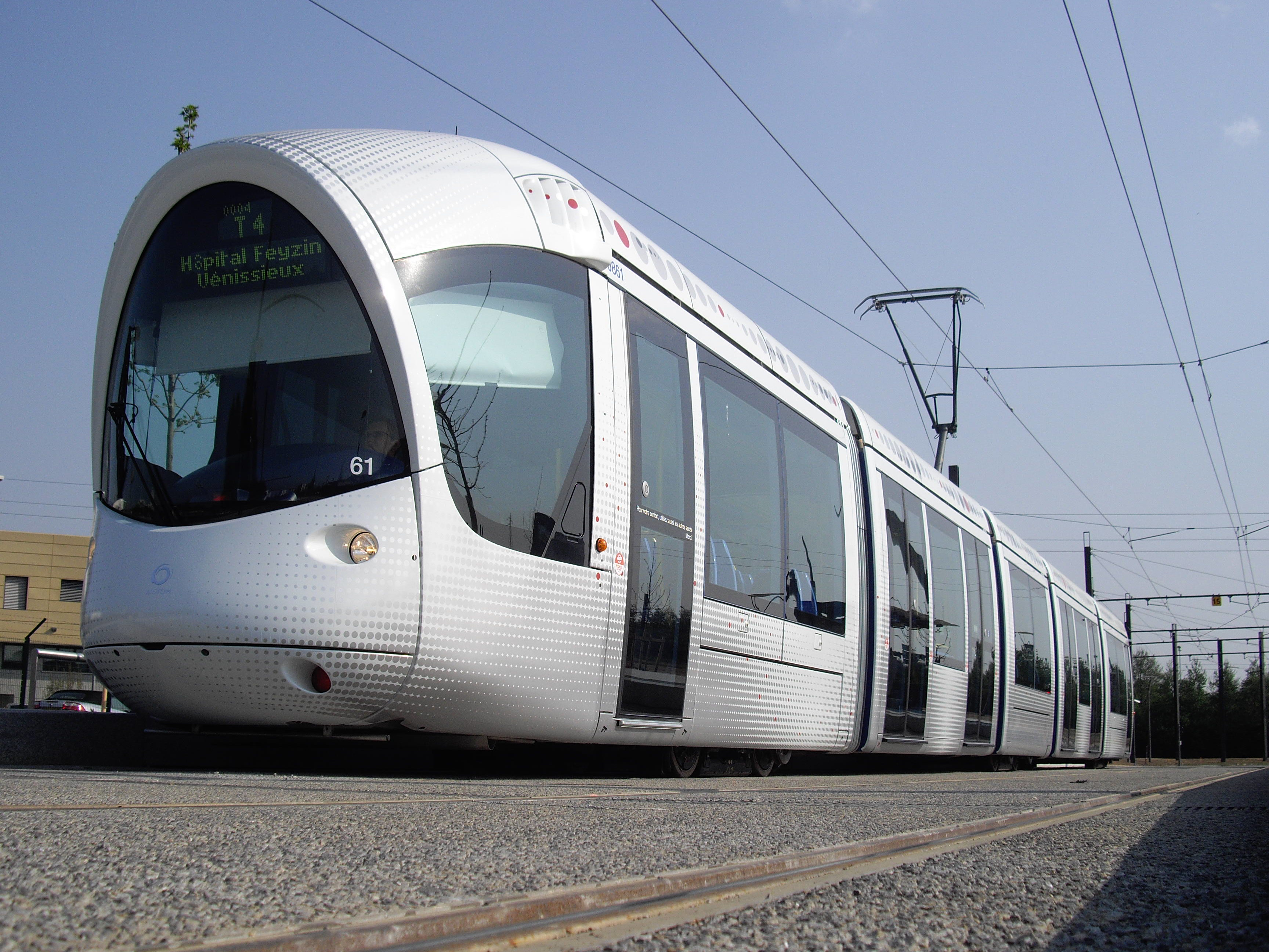 Alstom Citadis 302 n°861 sur la ligne T4 du réseau TCL, à son terminus Hôpital Feyzin Vénissieux.